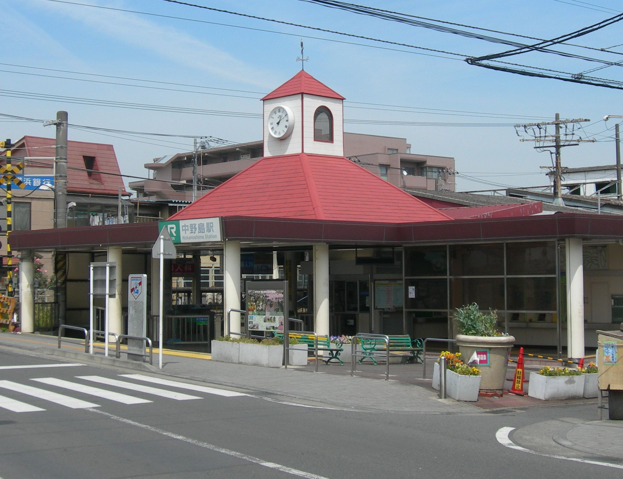 JR南武線 中野島駅